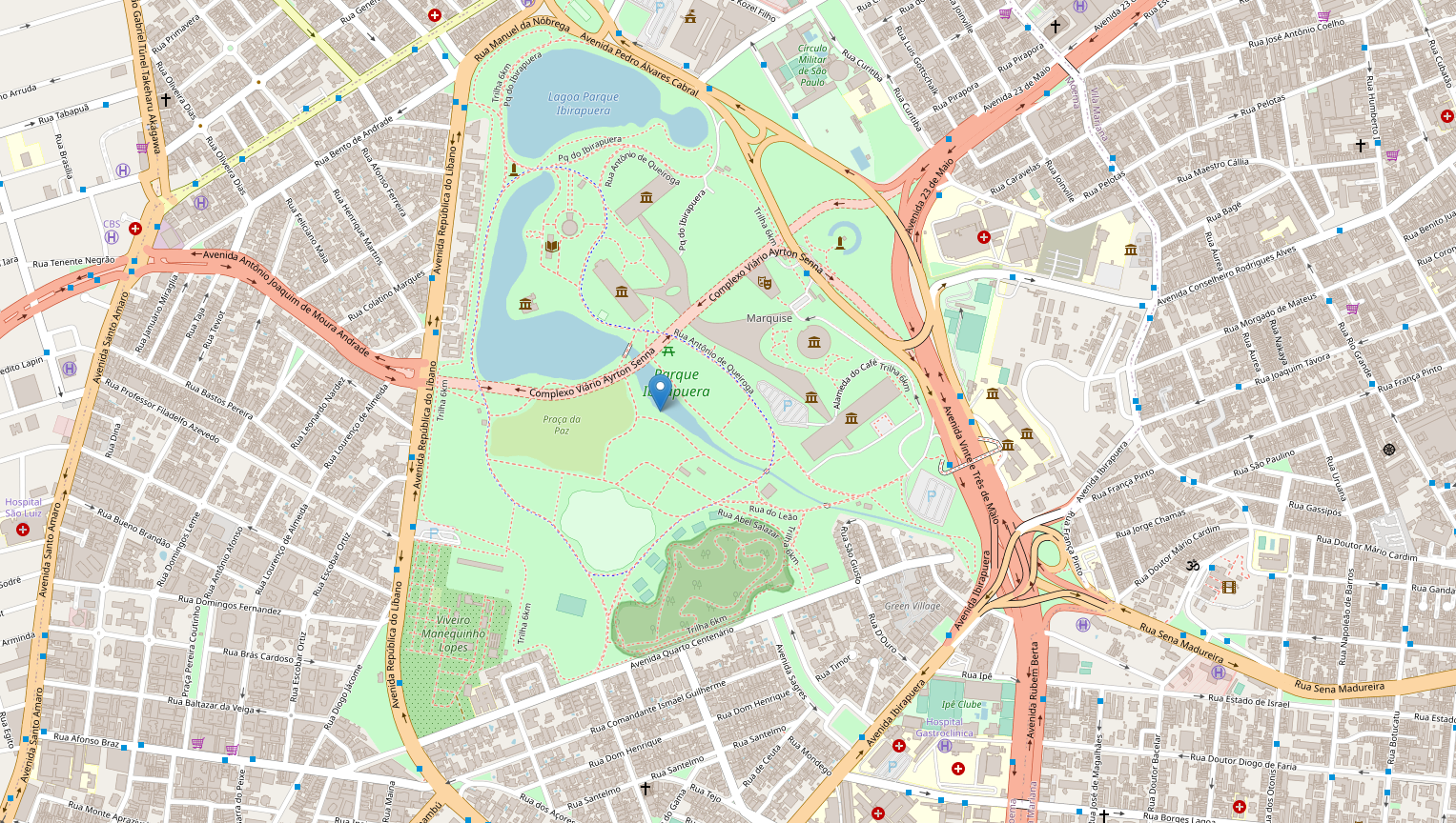 Mapa do Parque Ibirapuera, São Paulo, Brasil. This map may be incomplete, and may contain errors. Don't rely solely on it for navigation.